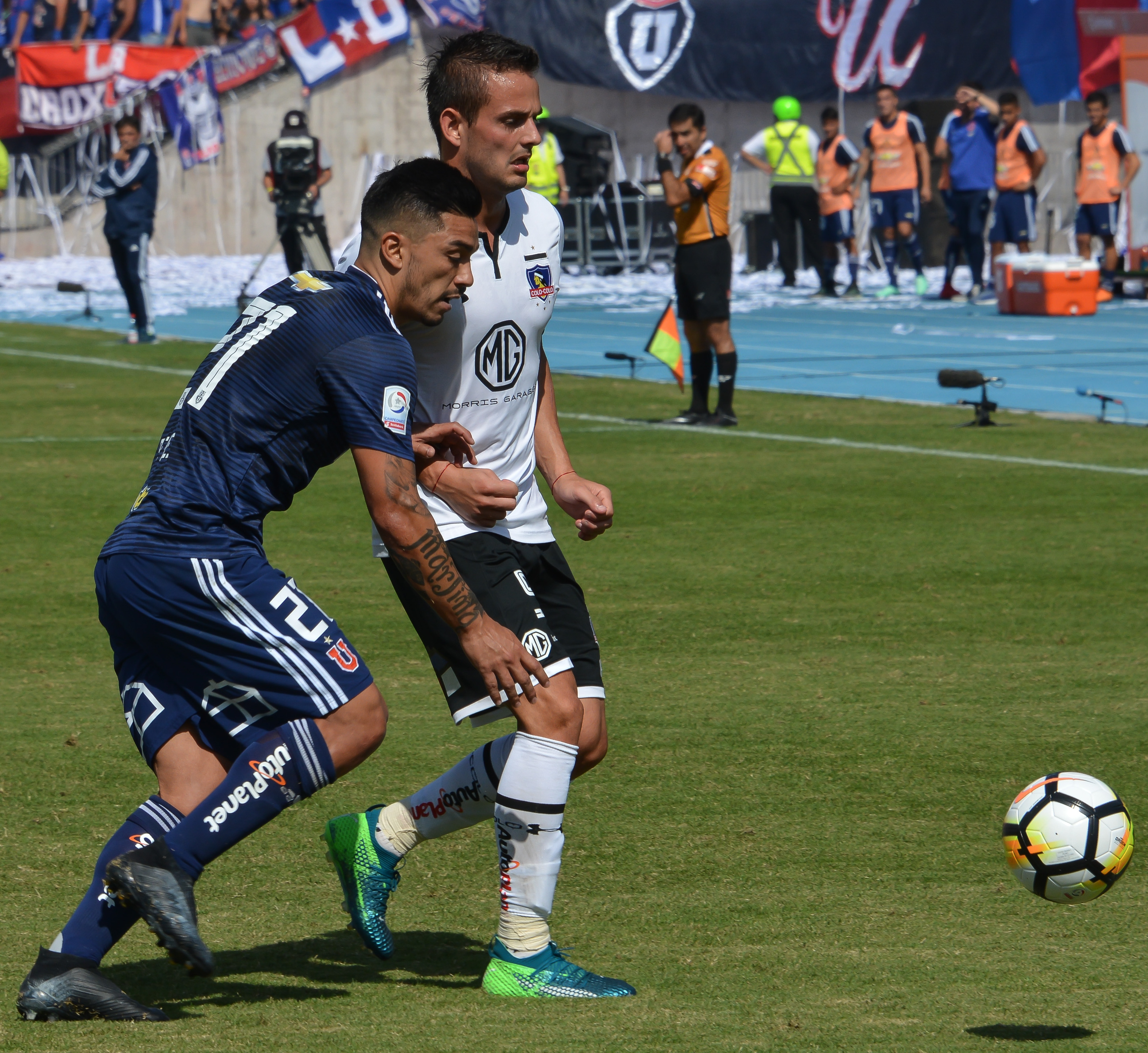 Universidad de Chile v Colo-Colo, Estadio Nacional, Santiago, Chile.